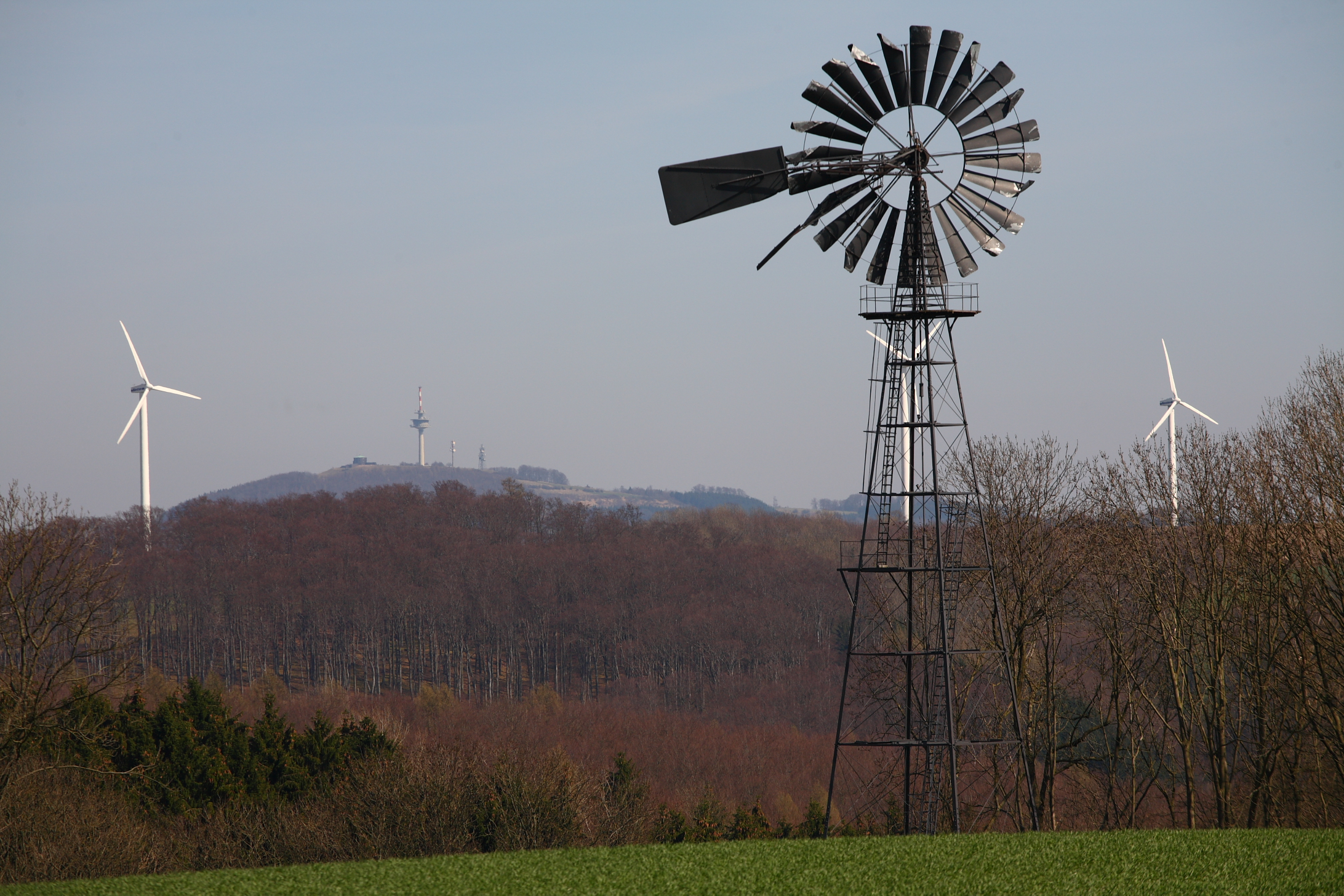 Windrad von Altenbergen mit Blick auf den Köterberg (erbaut 1908–1911; Windpumpe, diente bis 1959 zur Versorgung der Bewohner mit Frischwasser)